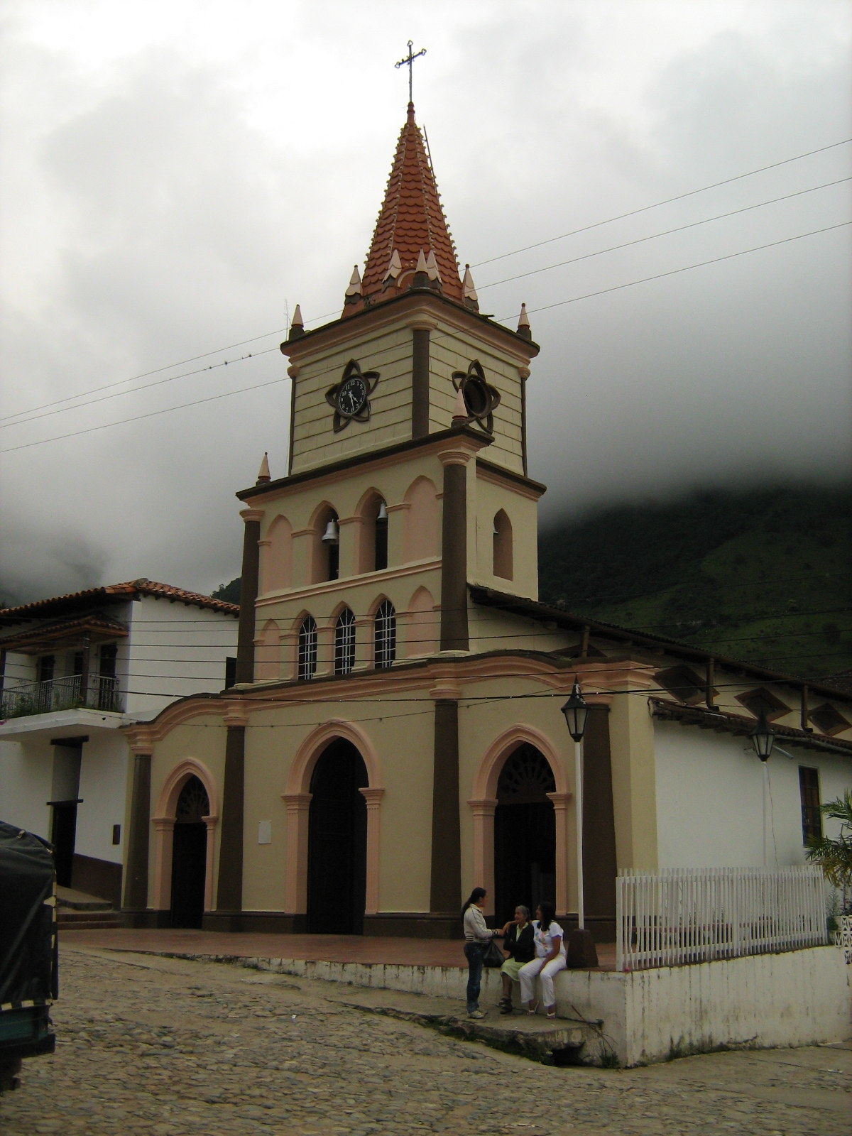 Iglesia de California, Santander